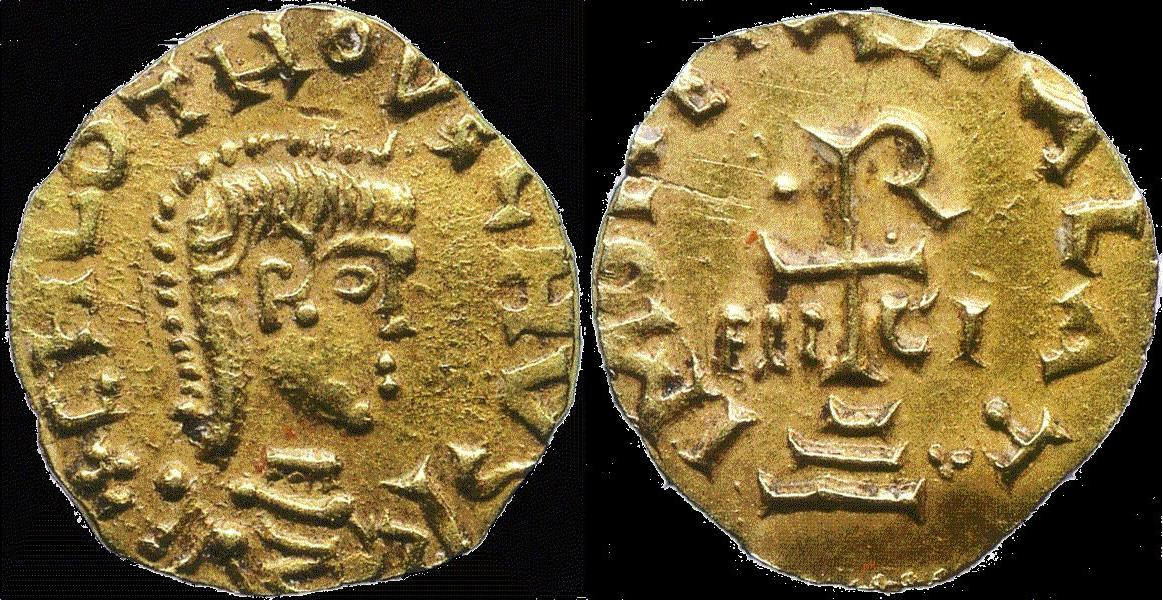 Tiers de sou d'or de Clovis II (639-657). Bibliothèque nationale. Avers: Effigie de Clovis II à droite, la nuque entourée de perles. Revers : Croix chrismée, sur 3 degrés, accostée des lettres ELI-CI.